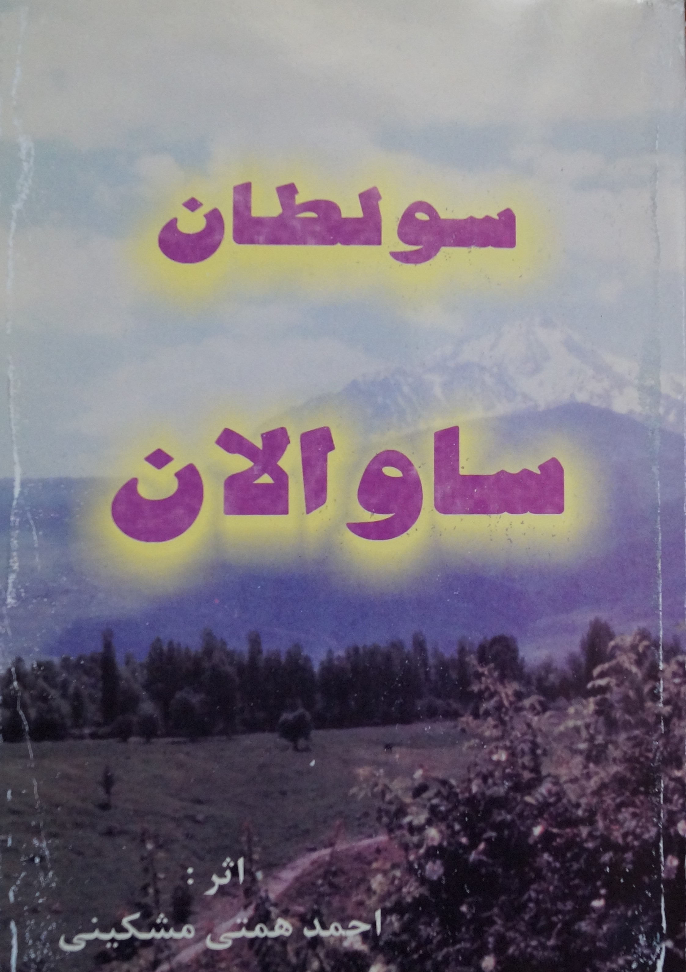 کتاب شعر سالان ساوالان